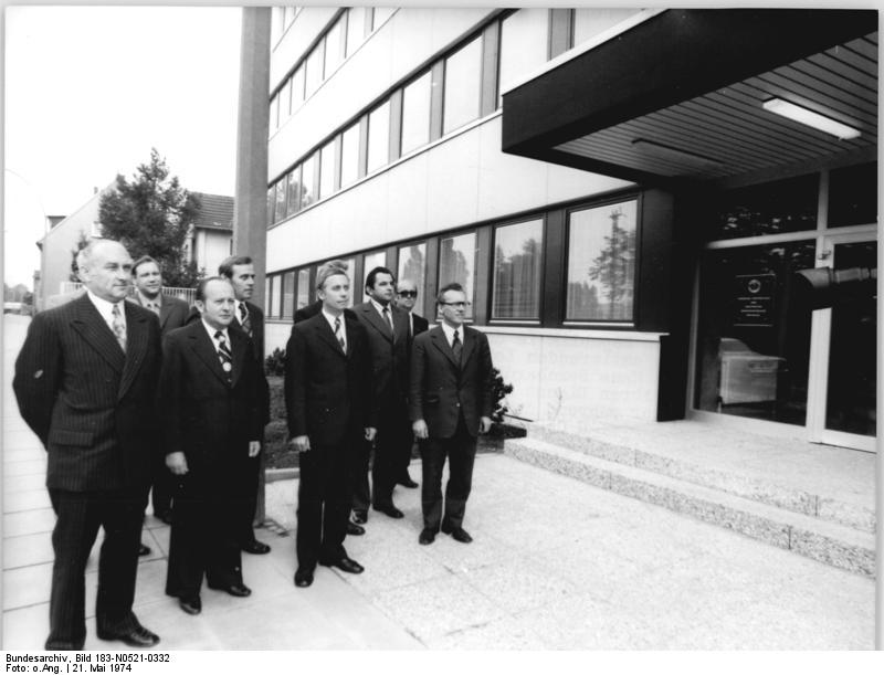 ADN-ZB 21.5.1974 BRD-Bonn Ständige Vertretung der DDR Entsprechend dem Grundlagenvertrag und dem Protokoll vom 14.3.1974 wurde die Ständige Vertretung der Deutschen Demokratischen Republik in der BRD am 2.5.1974 in Bonn eröffnet. Zum amtierenden Leiter der Vertretung wurde Botschaftsrat Hans Bernhardt (1.v.l.) ernannt. Die Vertretung wird ihren Dienst Anfang Juni 1974 aufnehmen. UBz: die Mitarbeiter während der Flaggenhissung vor dem Gebäude.